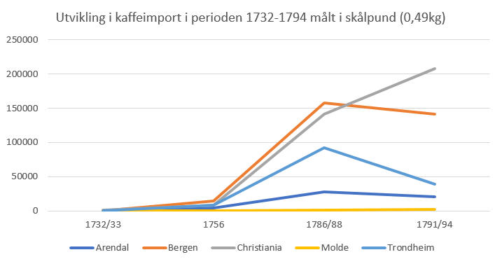 Oversikt over kaffeimport til Arendal, Bergen, Christiania, Molde og Trondheim fra 1732-1794 målt i skålpund (0,49kg).